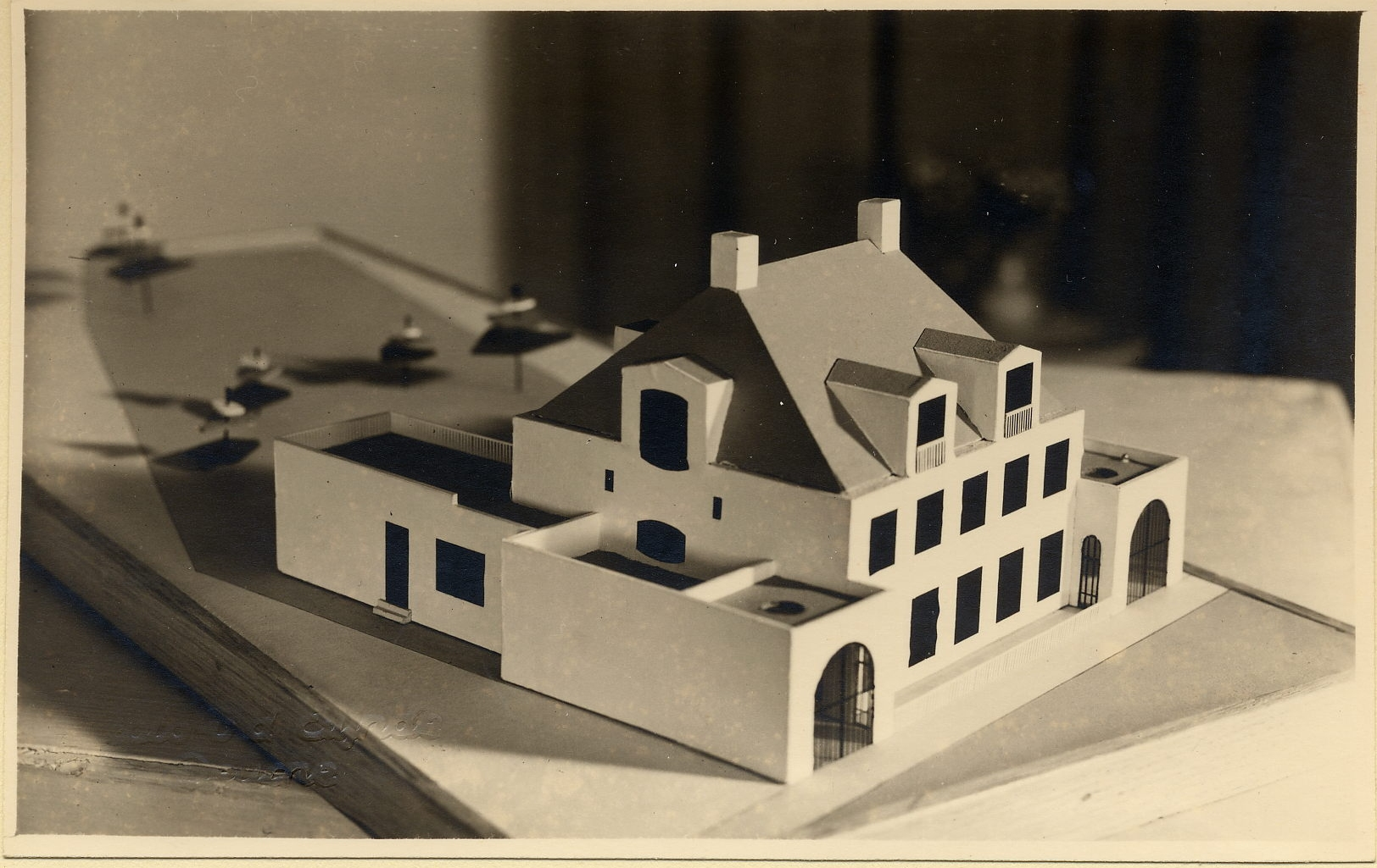 De maquette van het pand Stationsstraat 25 te Deurne (Nederland)